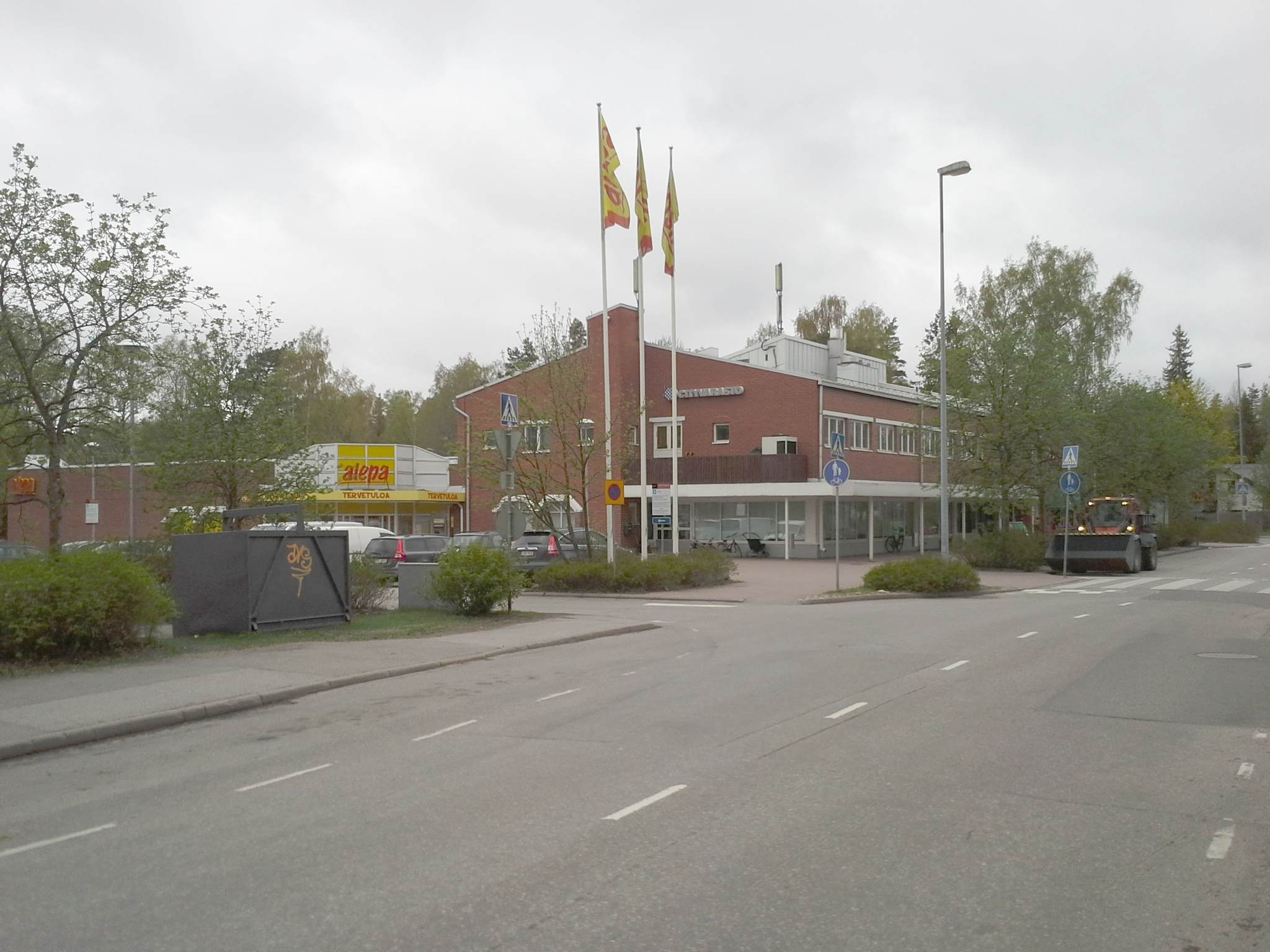 Laajalahden liikekeskus toukokuussa 2014